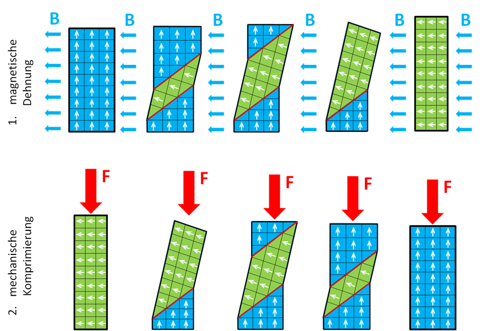 MSM-Prinzip